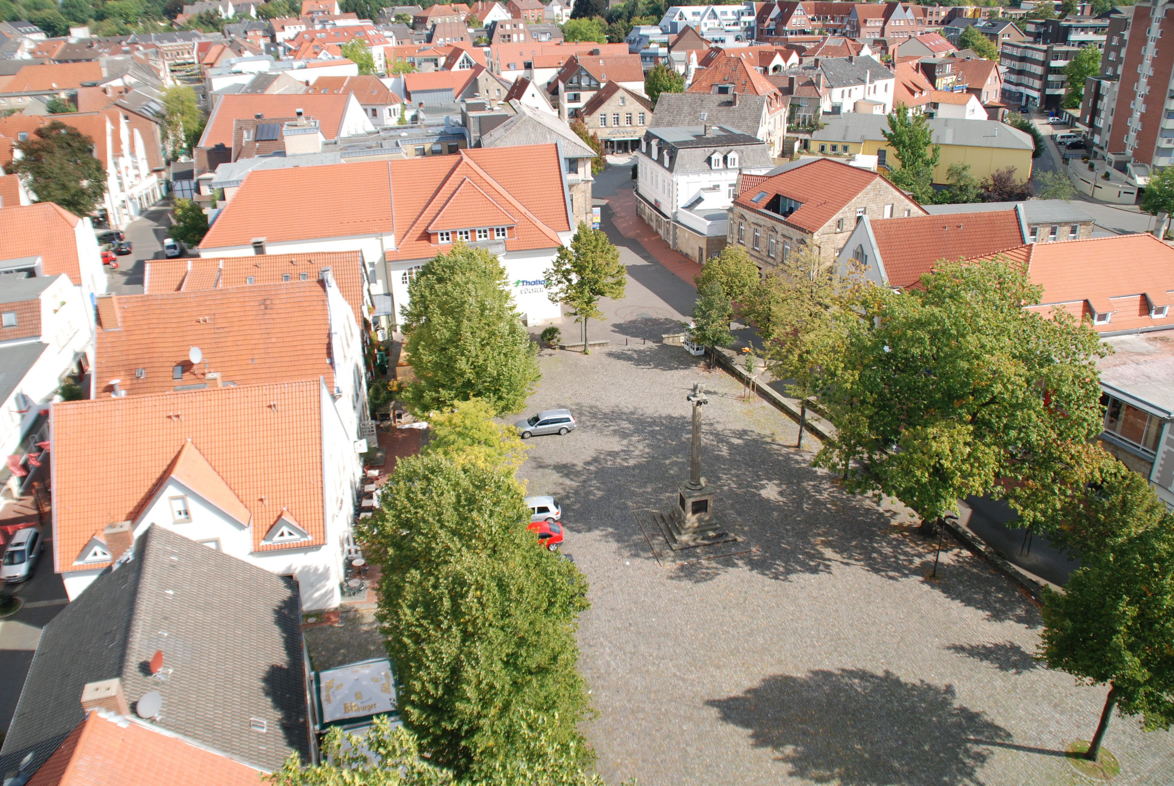 Blick vom Turm der Christuskirche auf den Kirchhof.